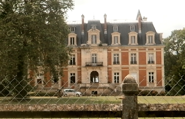 Château de la Briche (façade ouest)